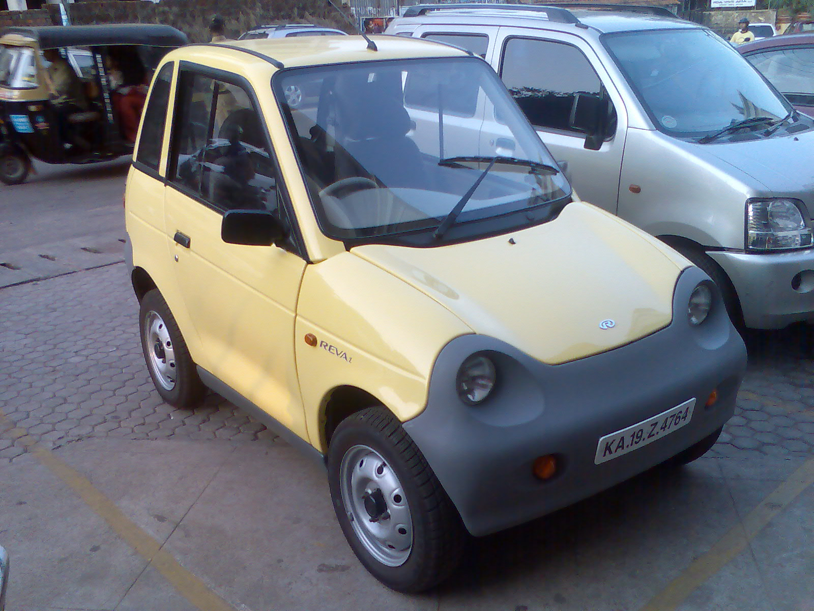 Reva Electric Car